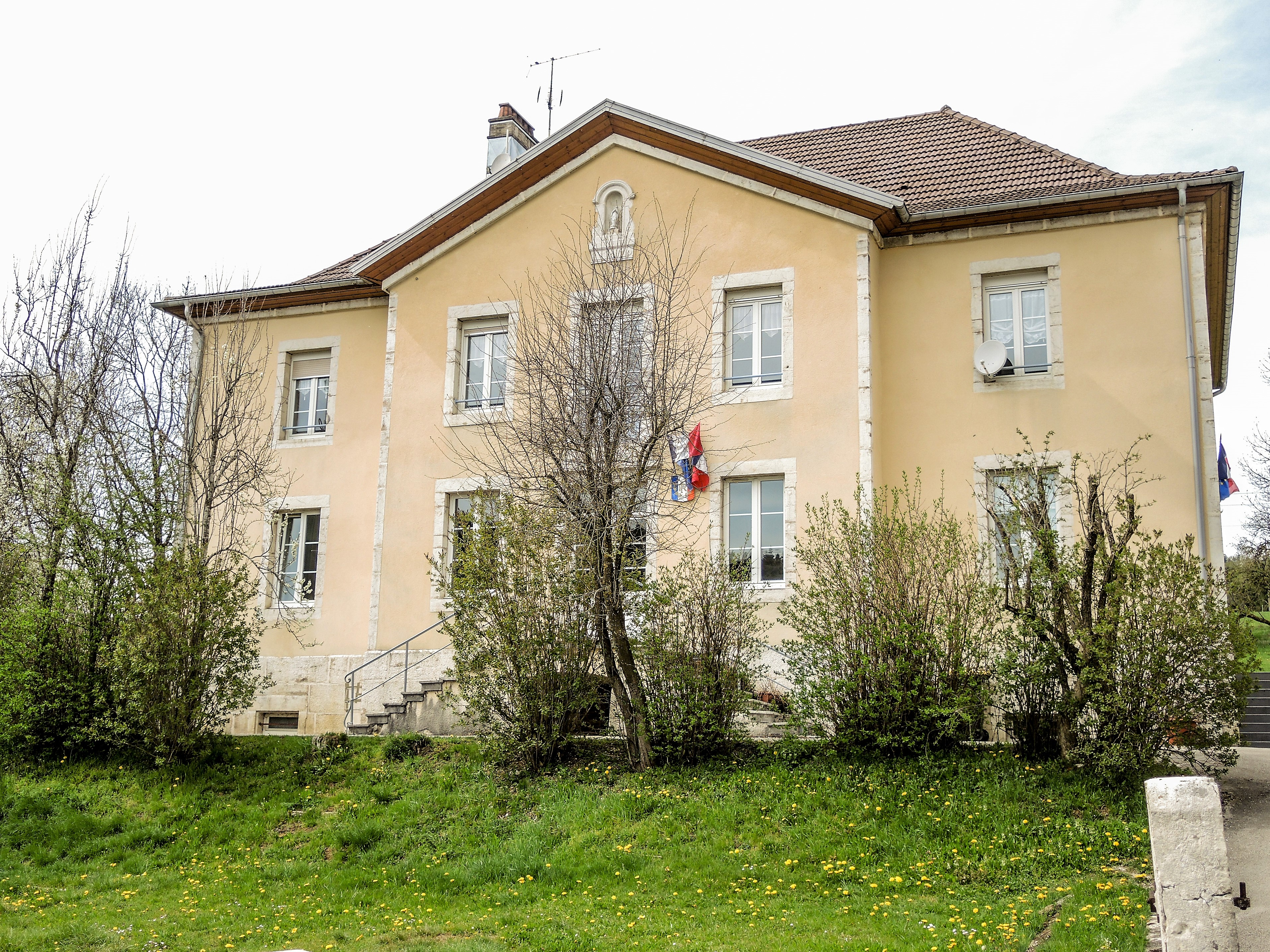 Mairie